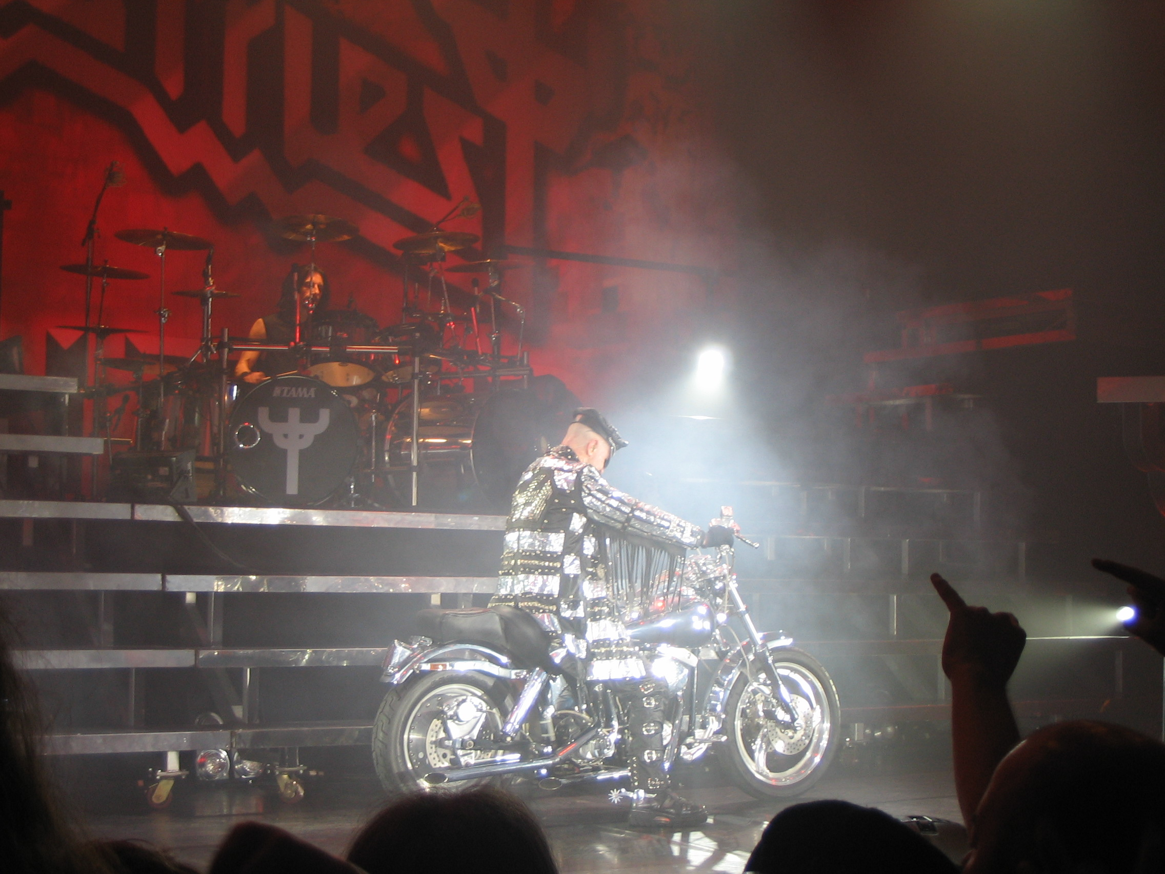 Emiliàn e rumagnòl: Rob Halford in sima a la sò mòta, tòlt śò in sal palc ad Plymouth in dal Régn Unî al 31 ad Mars dal 2005